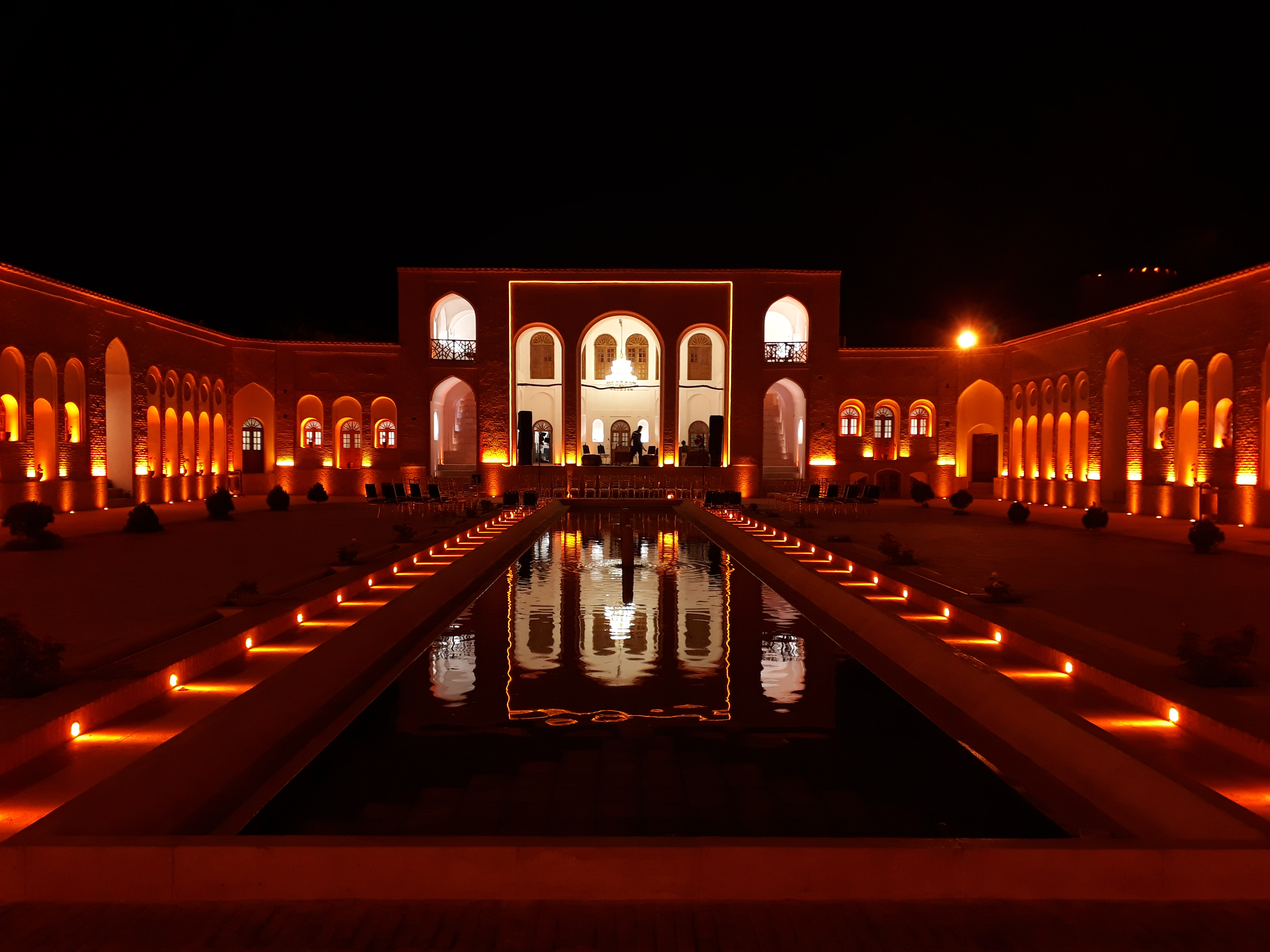 مجموعه حاج آقا علی رفسنجان ، کرمان دوره قاجاریه